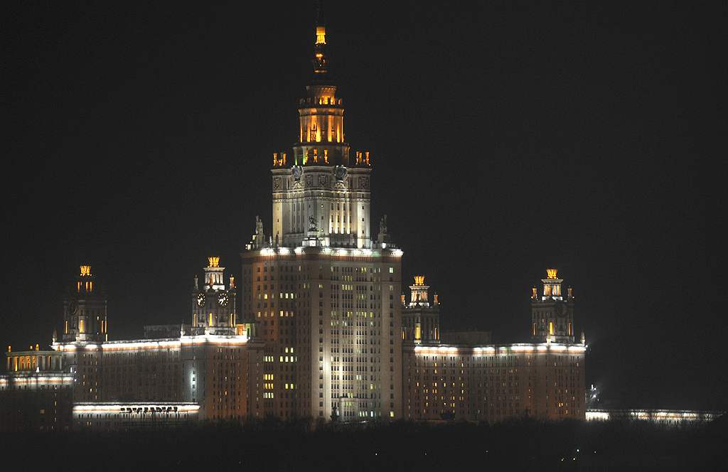 МГУ